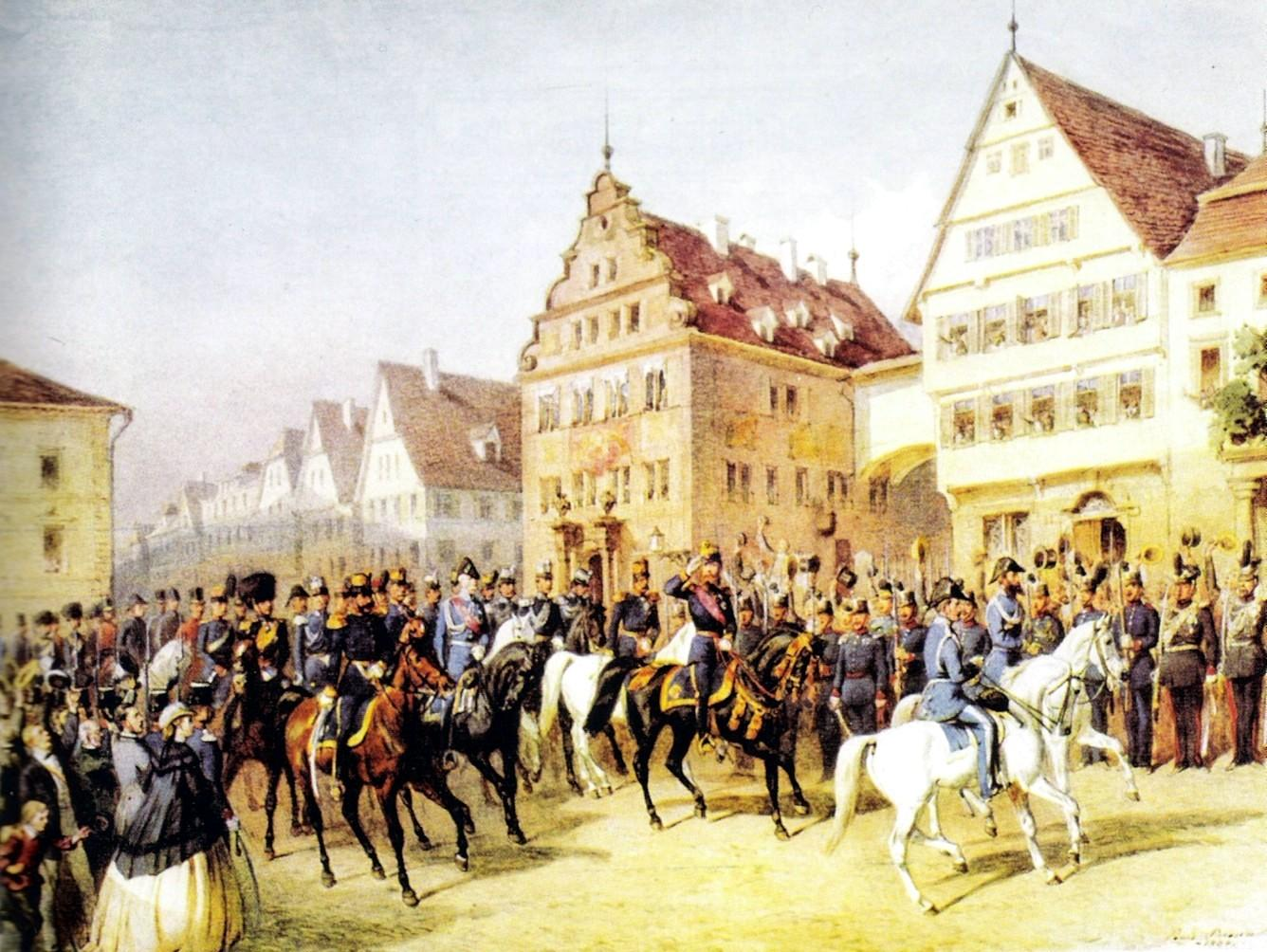 Stuttgart: König Karl von Württemberg bei der Eröffnung des Landtags (Aquarell)